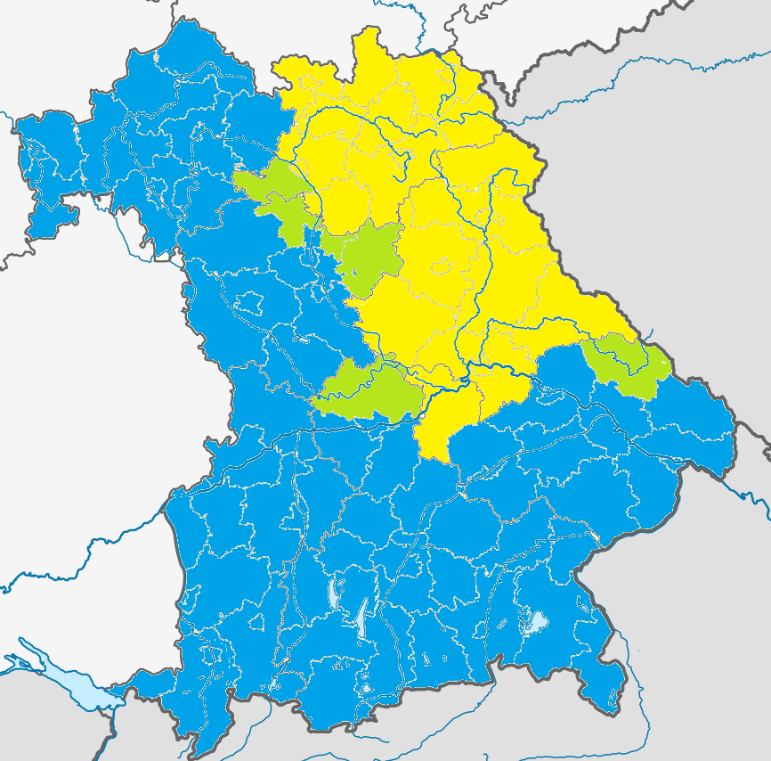 Schafkopf mit kurzem und langem Blatt